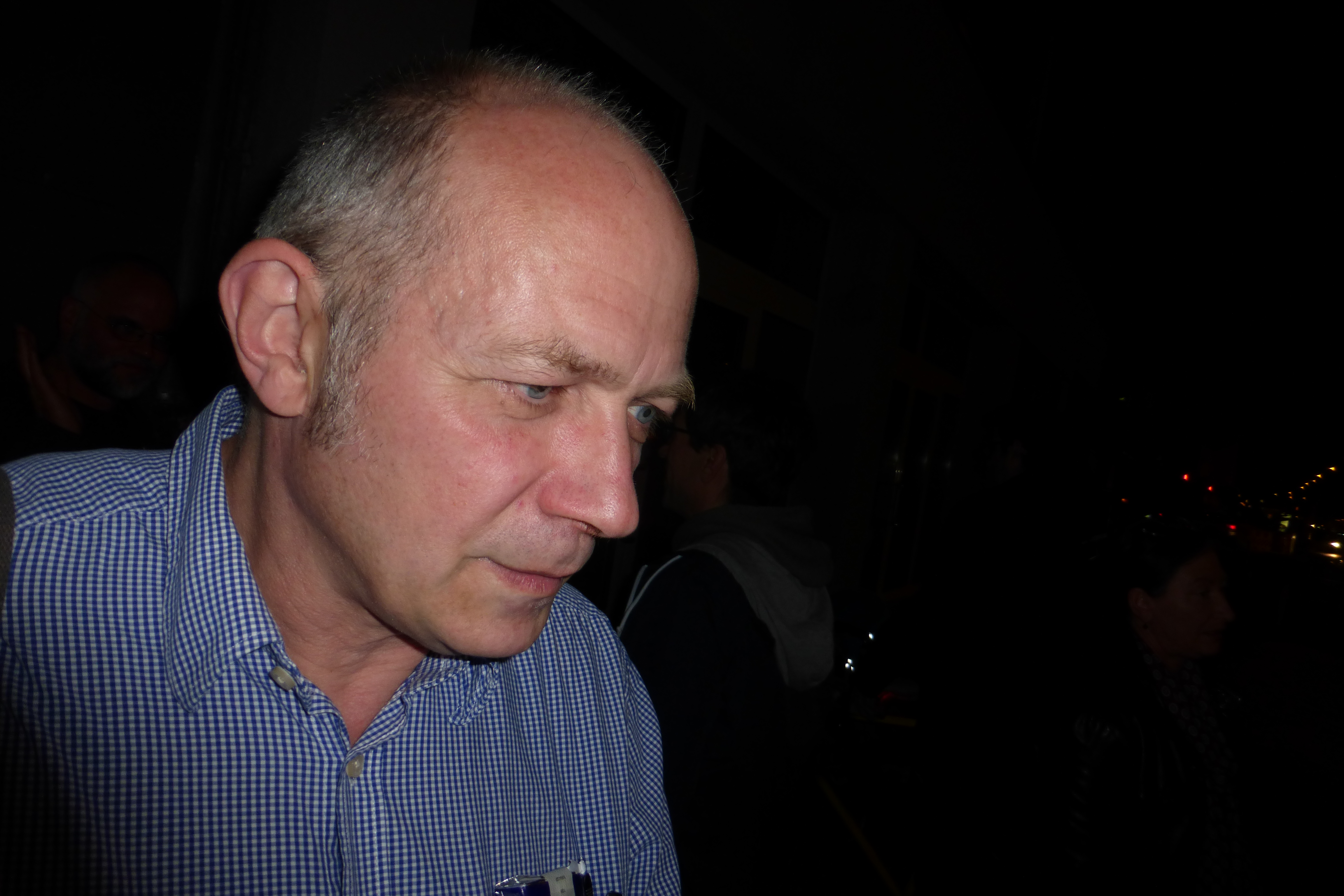 Der Dichter in 2013